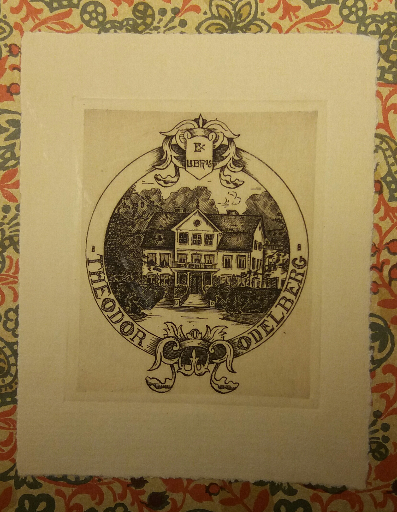 Ex Libris föreställande Enskede gård. I boken Clas Livijn, bihang Spader Dame, av Mila Hallman, Sthlm 1909.